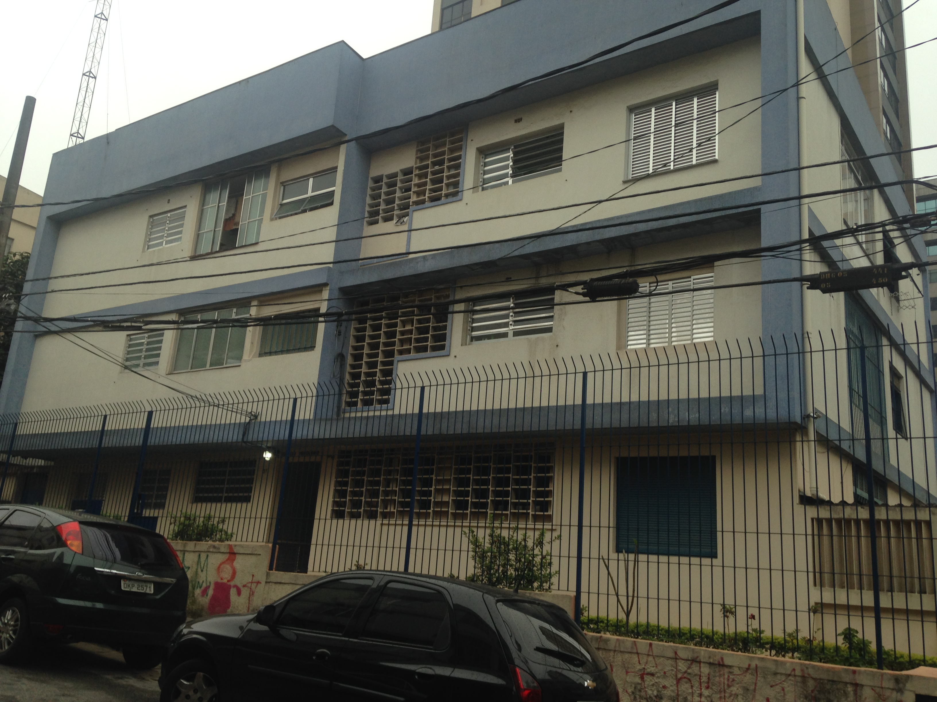 Fachada e lateral do prédio Vergueiro.